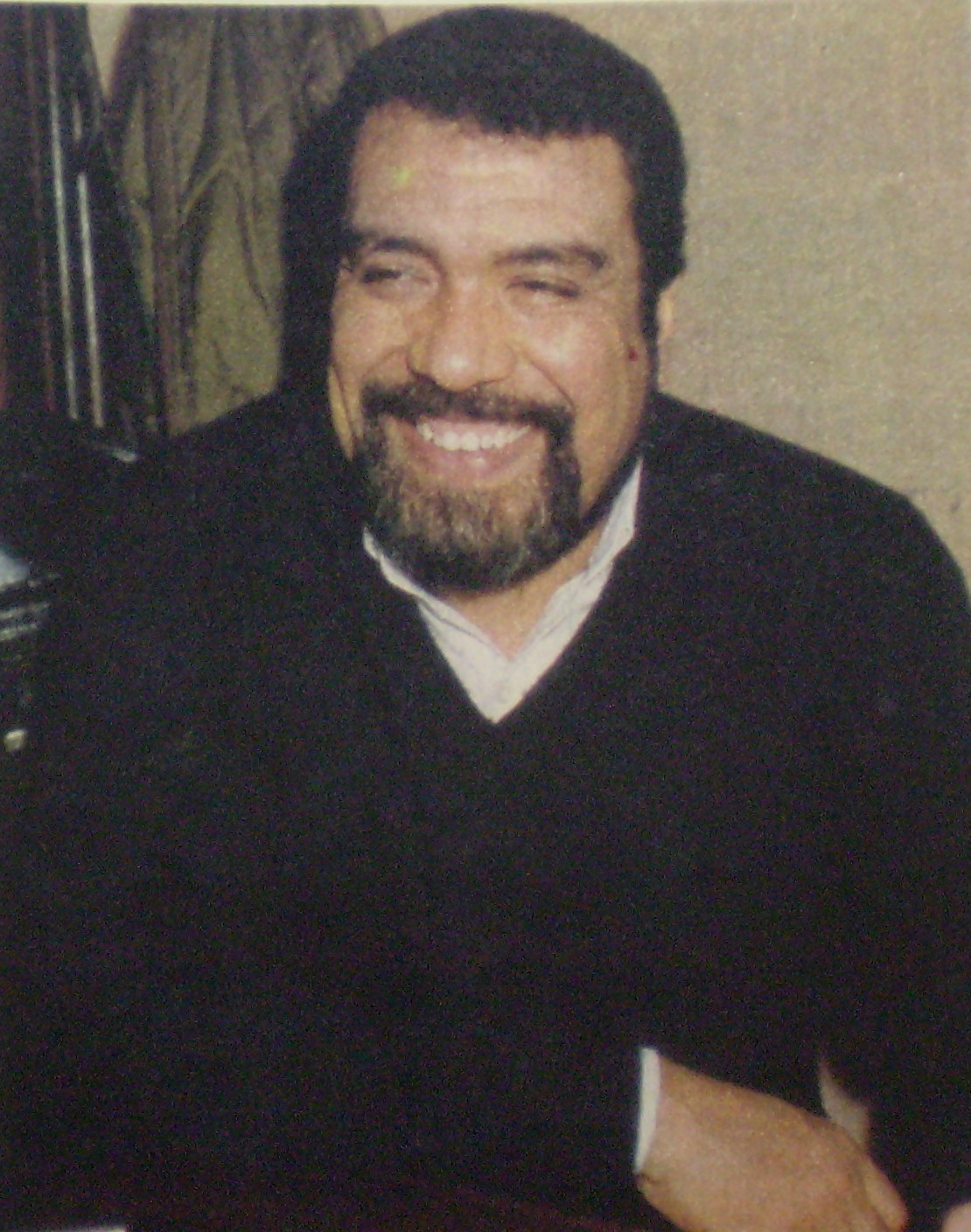 Dino Saluzzi